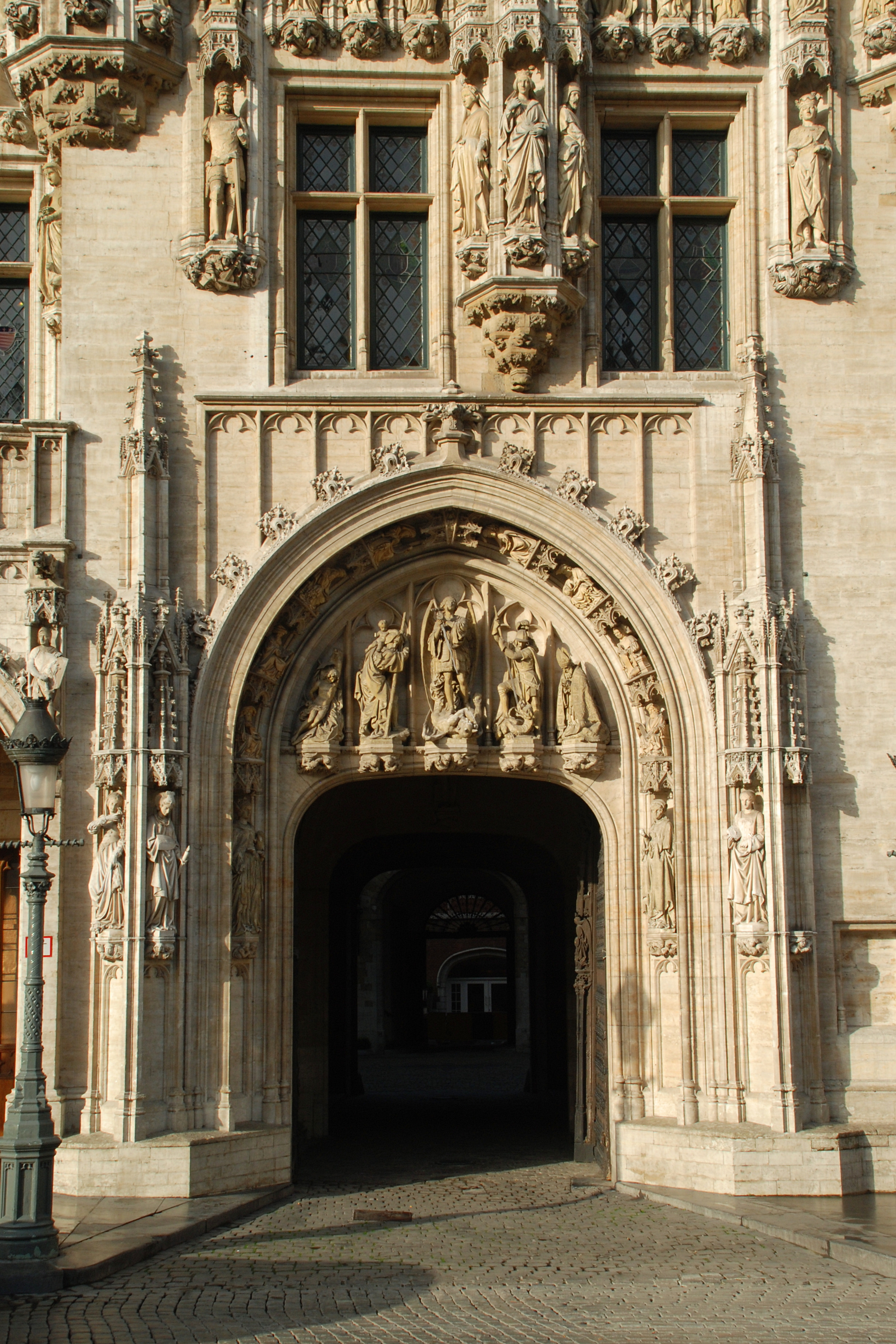 Belgique - Bruxelles - Hôtel de ville de Bruxelles